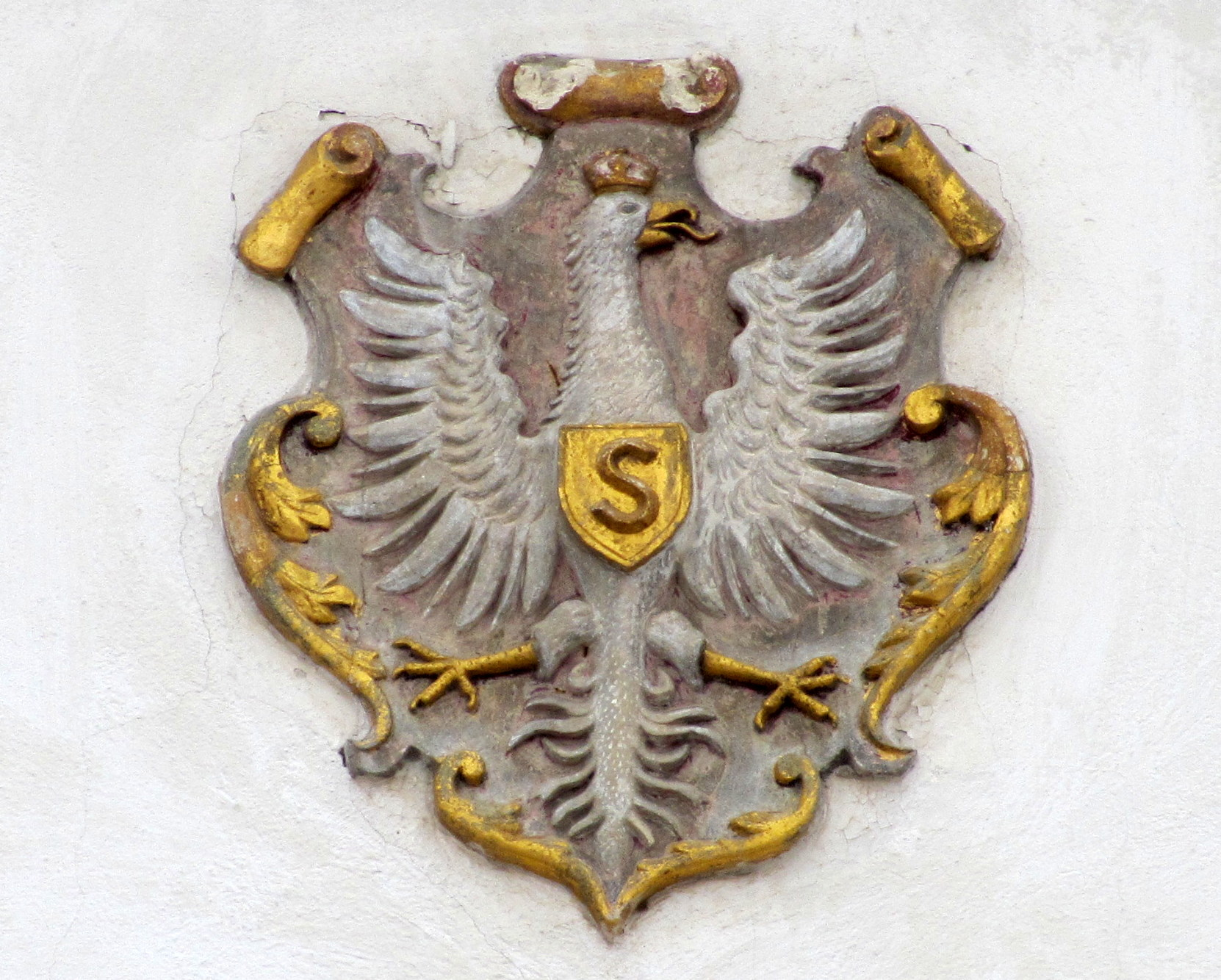 Umieszczony na elewacji zamku w Sandomierzu powstały w XVI wieku wizerunek białego orła z literą S od łacińskiego imienia Sigismundum króla Zygmunta Starego.